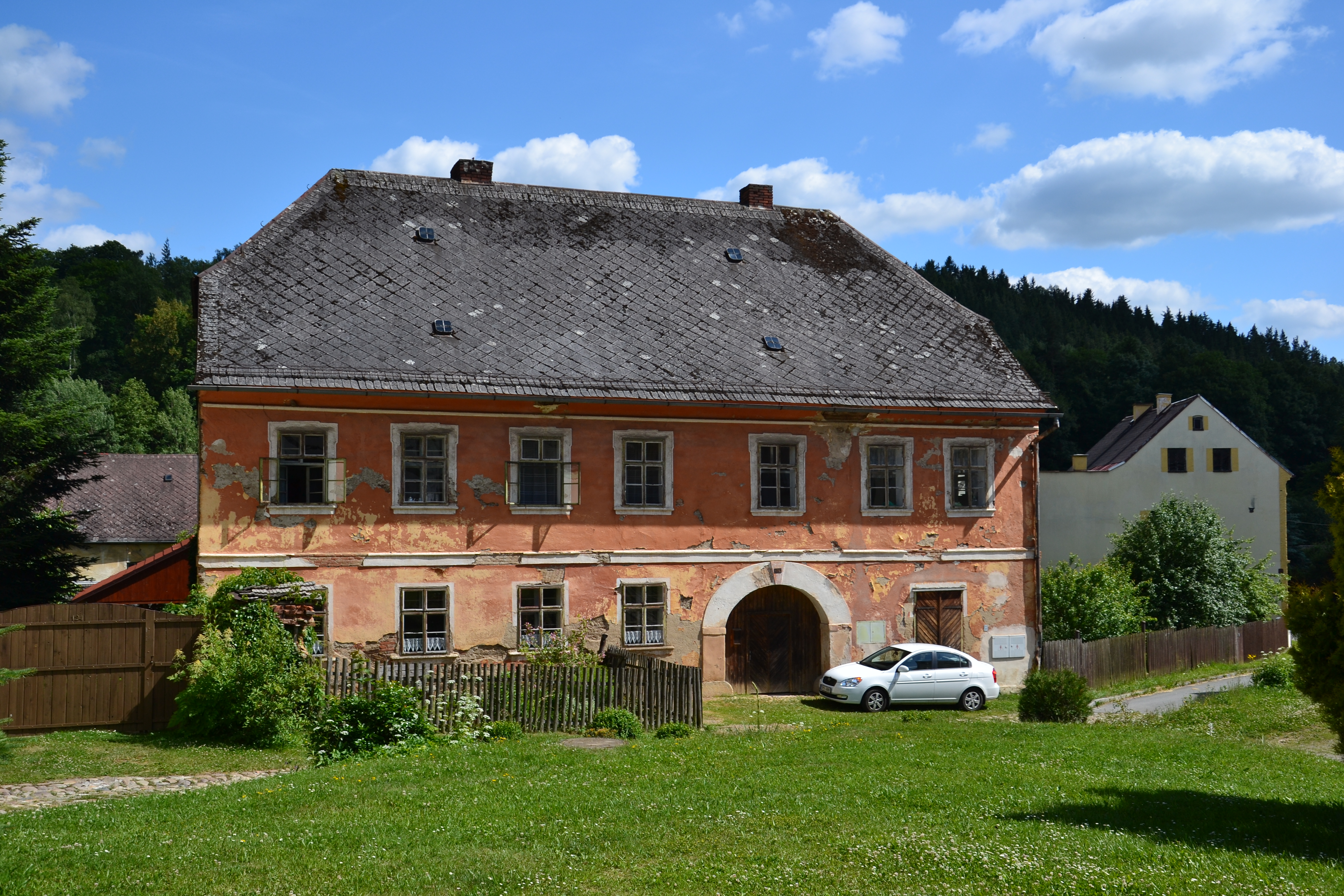 Měšťanský dům (Úterý), Úterý 126